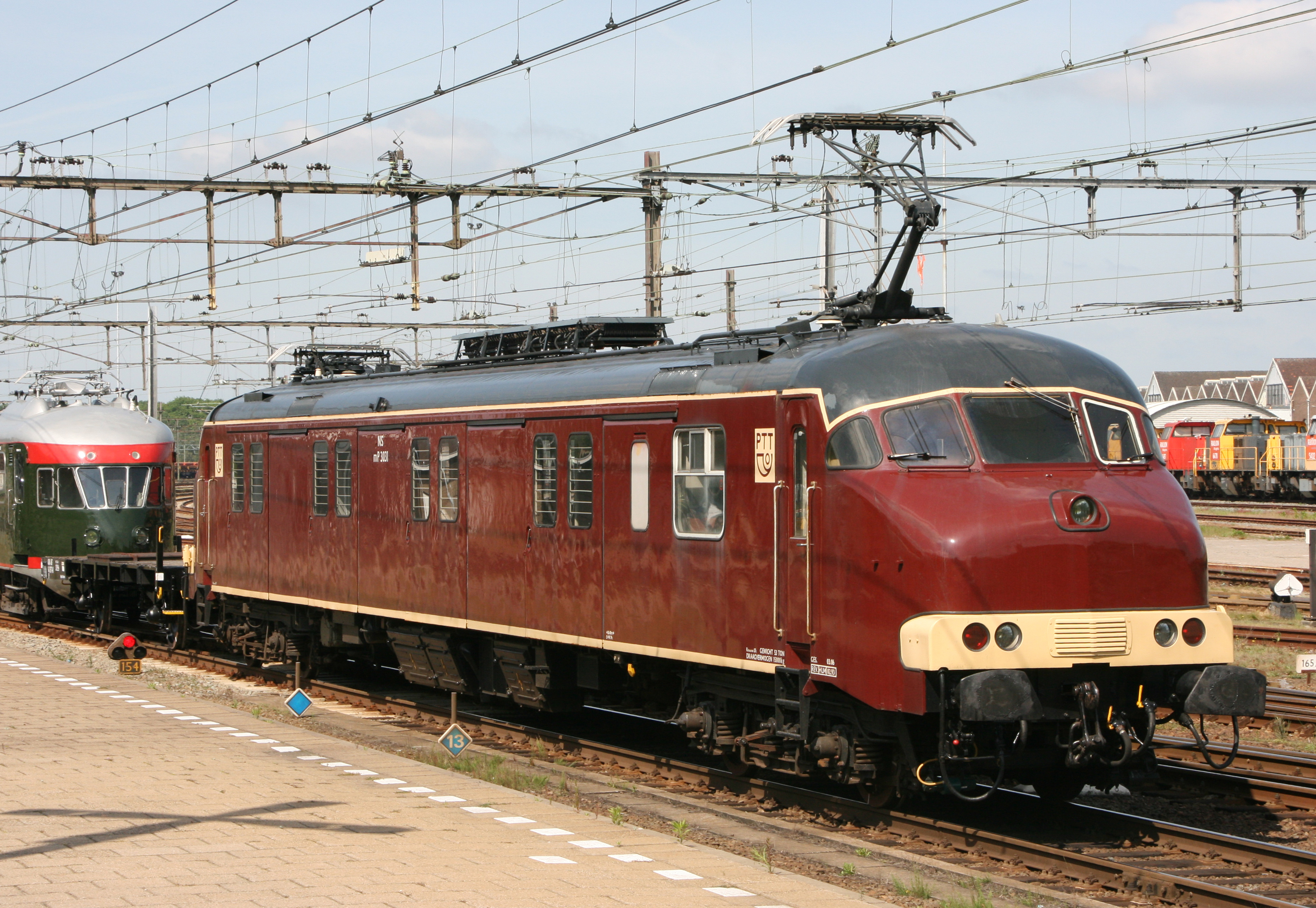 De Motorpost loopt met geheven stroomafnemer achterop het transport van Museummateriaal op 17 mei 2014.